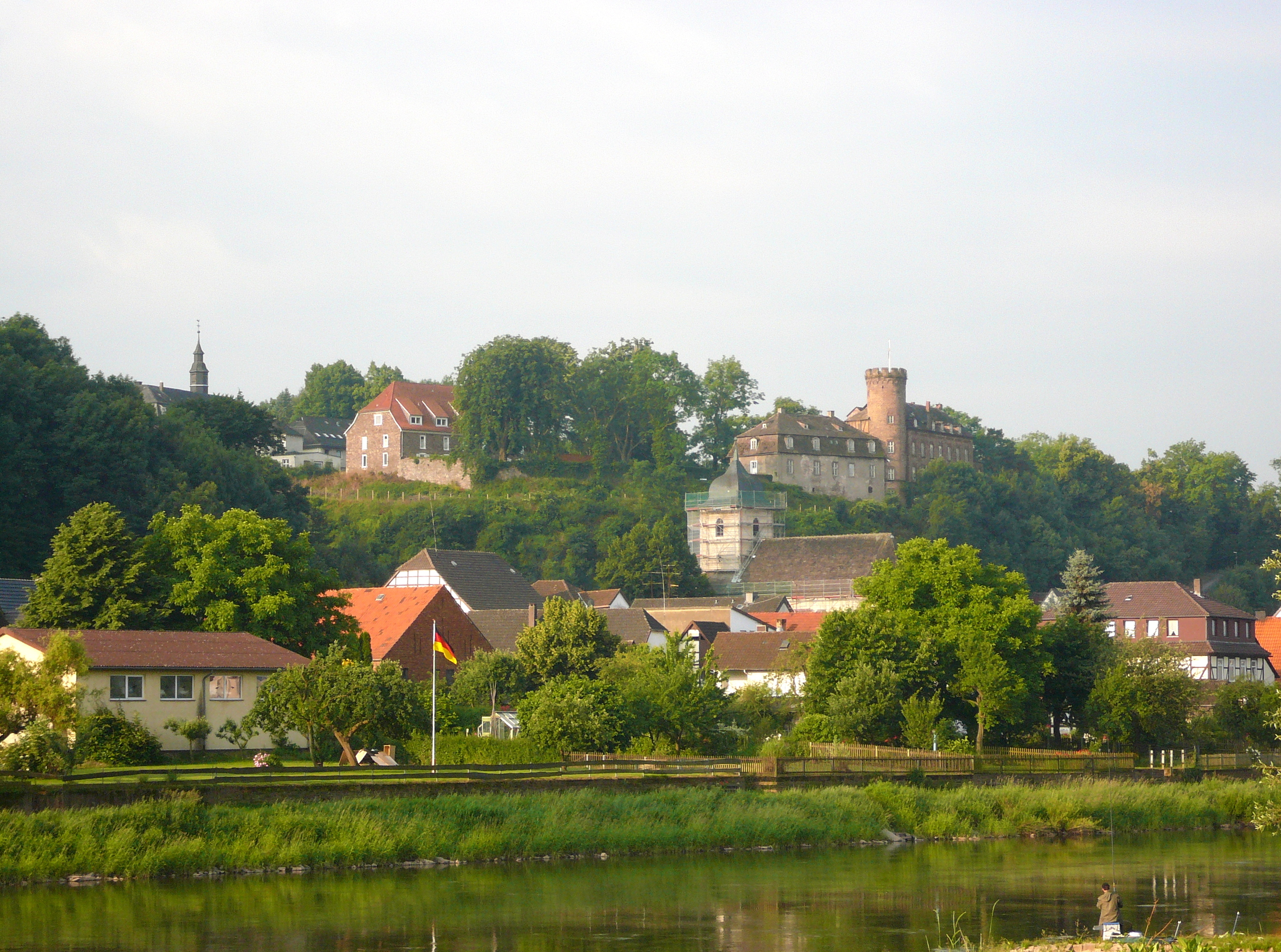 Blick von Nordosten über die Weser auf Herstelle, Stadt Beverungen, Landkreis Höxter, Ostwestfalen. Rechts oberhalb der Kirche die Burg Herstelle (erbaut 1832), links davon das größtenteils verdeckte Kloster (mit Dachreiter).